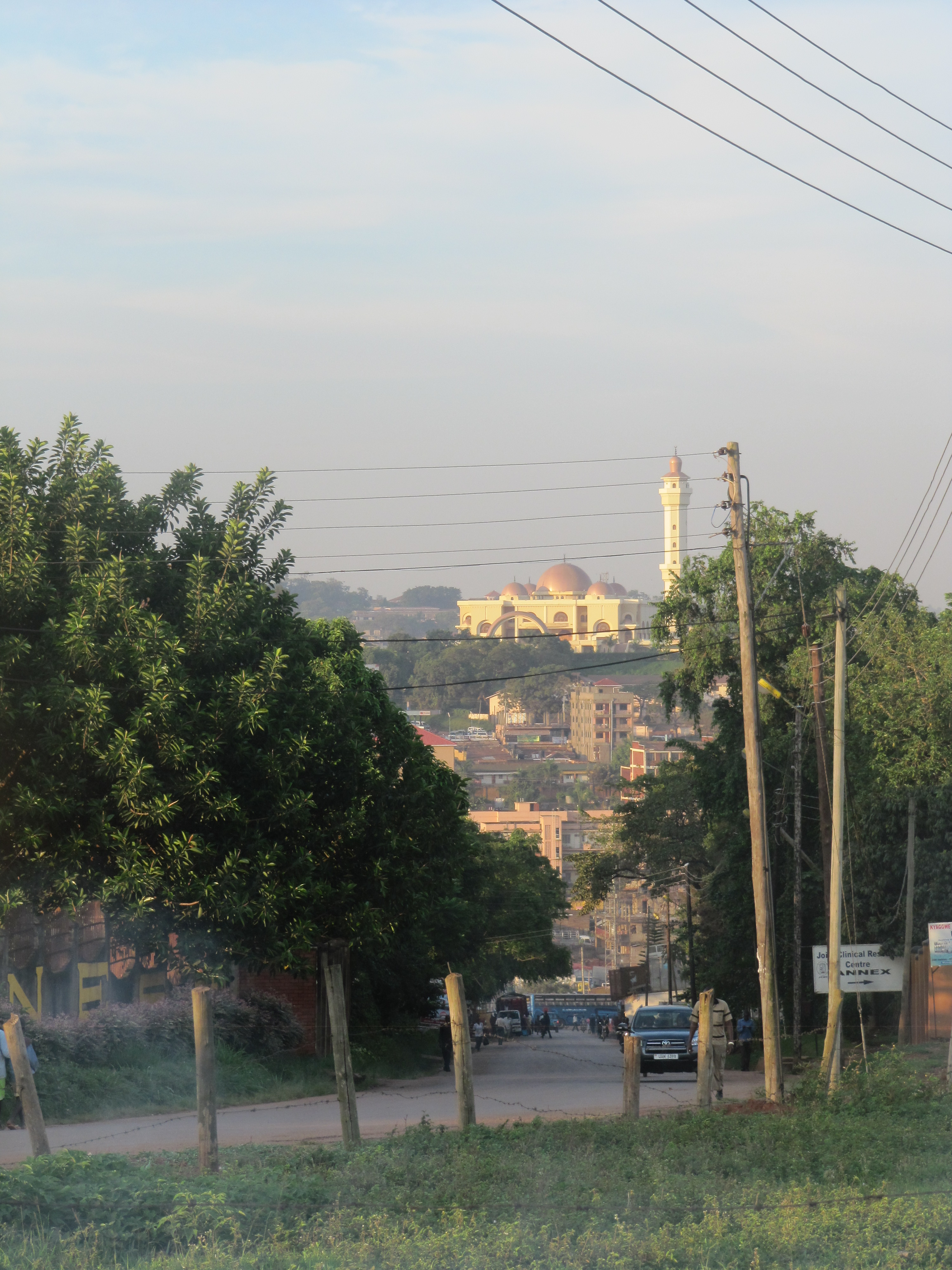 Gaddafi National Mosque, Kampala